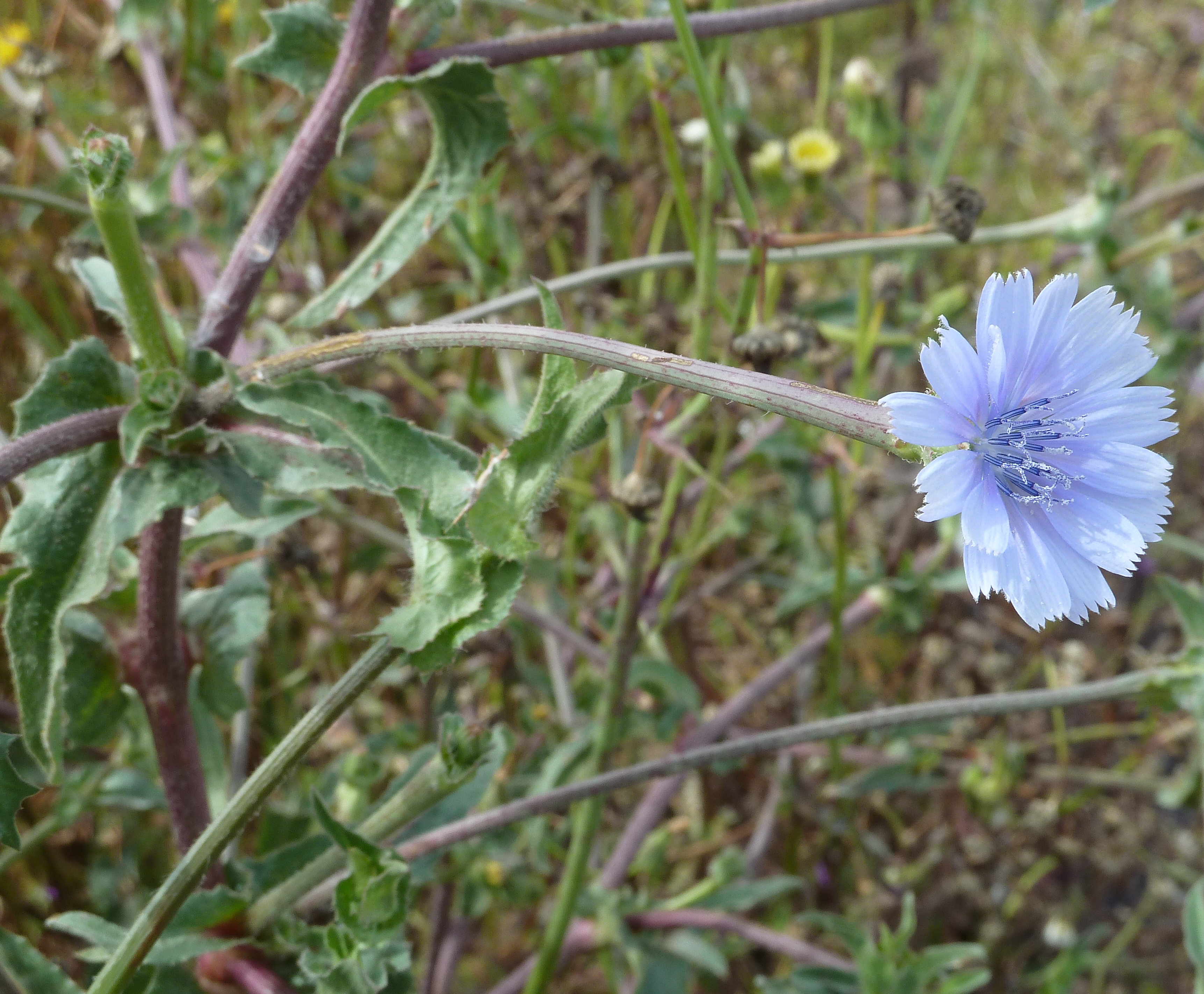 Cichorium intybus : Flor con su largo, rígido y estriado pedúnculo - Camino de la Acequia de Cox, Albatera (Alicante, España).